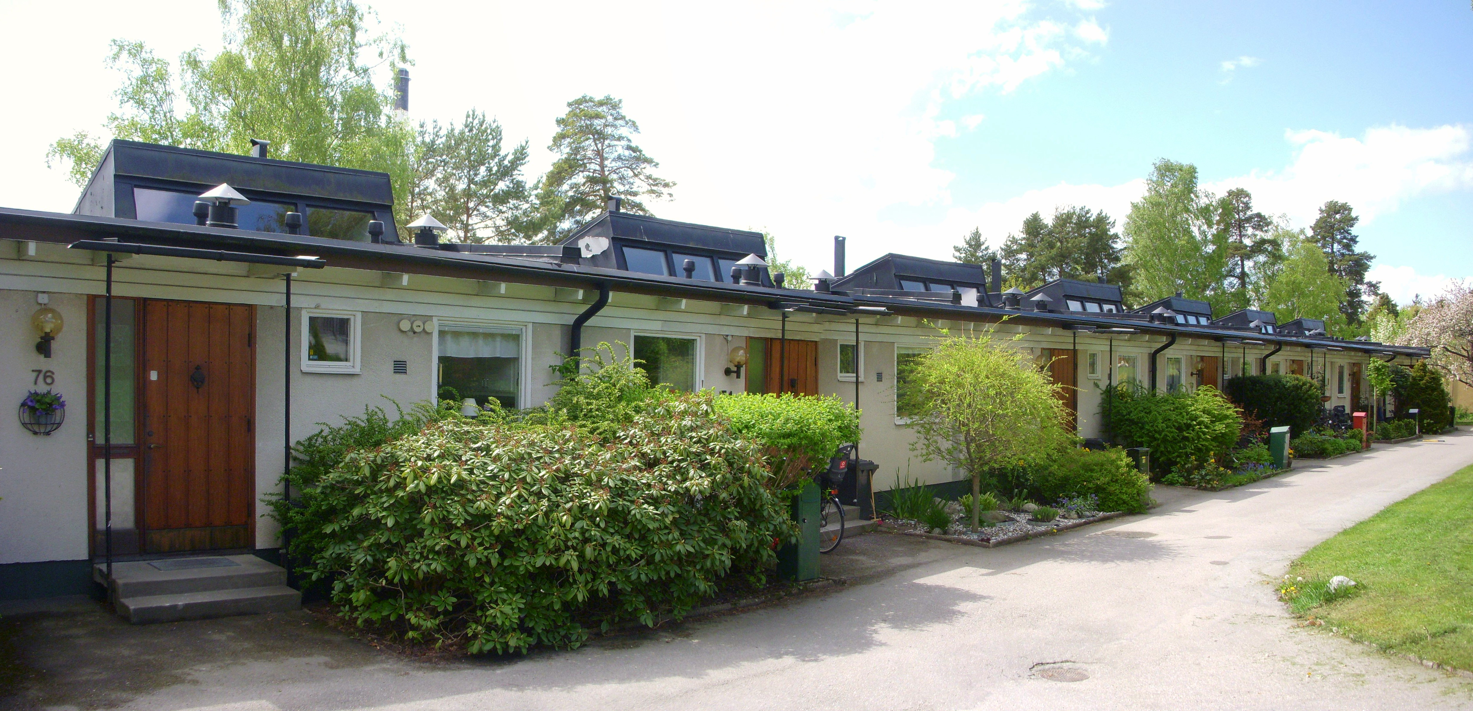 Radhusområde Fresia 5, Måbärsstigen, i Hässelby strand (kallad "Radiohusen") arkitekter Bertil Karlén och Josef Stäck